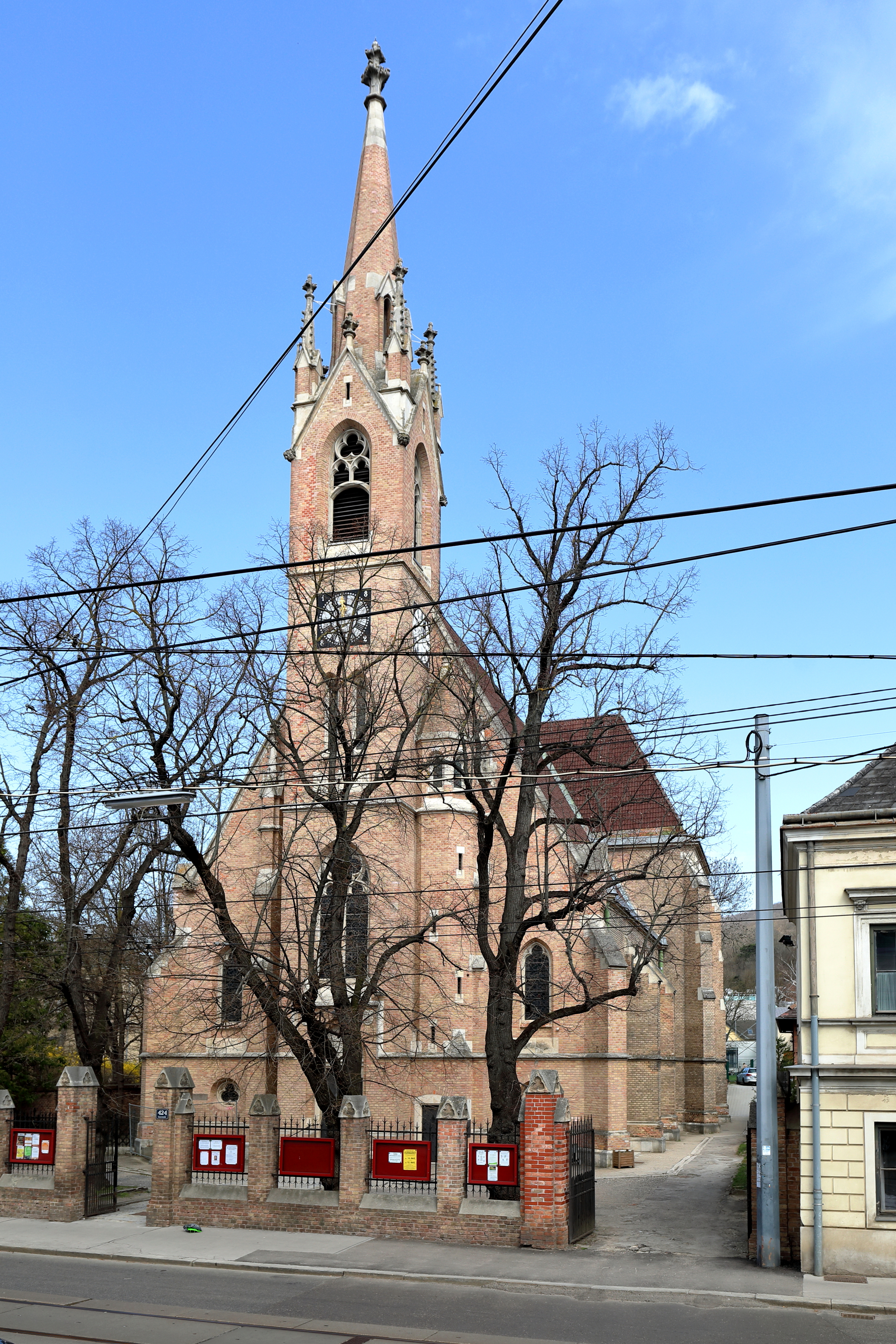 Die röm.-kath. Hütteldorfer Pfarrkirche Hl. Andreas im 14. Wiener Gemeindebezirk Penzing. Der neugotische Backsteinbau mit einem 43 Meter hohen Fassadenturm wurde nach Plänen des Architekten Richard Jordan ab 1881 errichtet und am 9. November 1882 durch Erzbischof Ganglbauer geweiht.